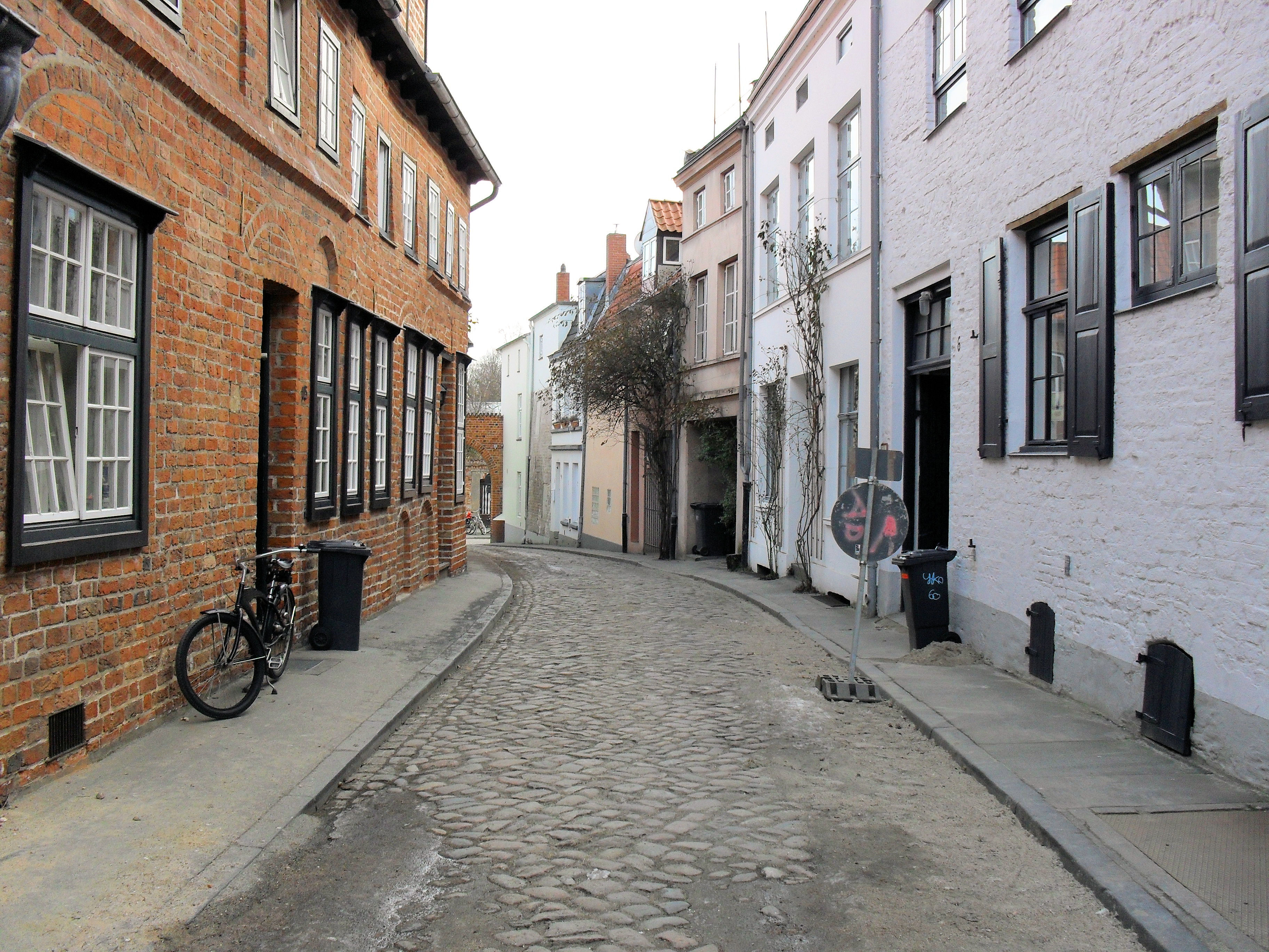 Die Düvekenstraße in Lübeck